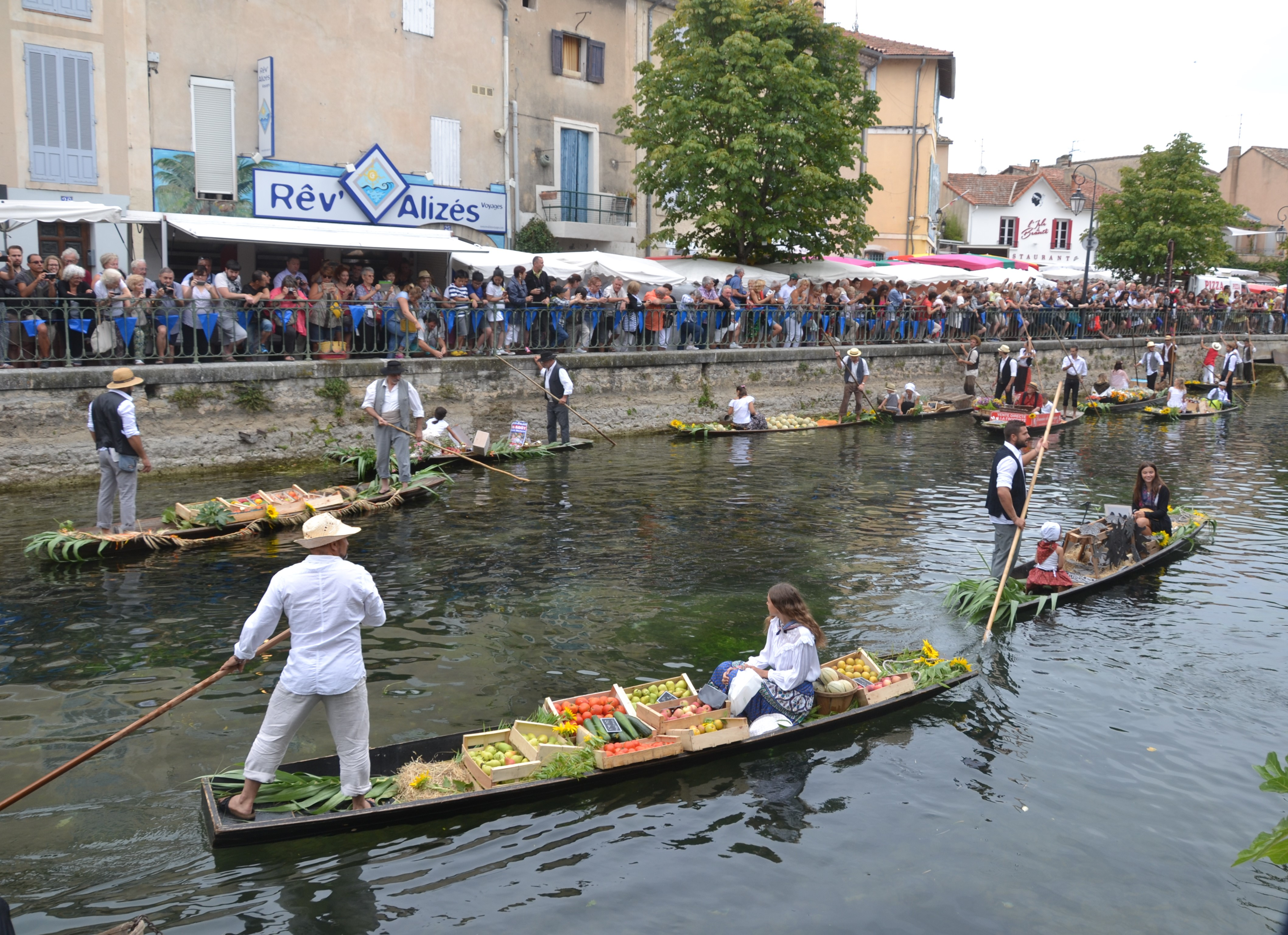 Marché flottant à L'Isle sur la Sorgue, sur des Négo-chins. Les vendeurs sont habillés en costume provencal